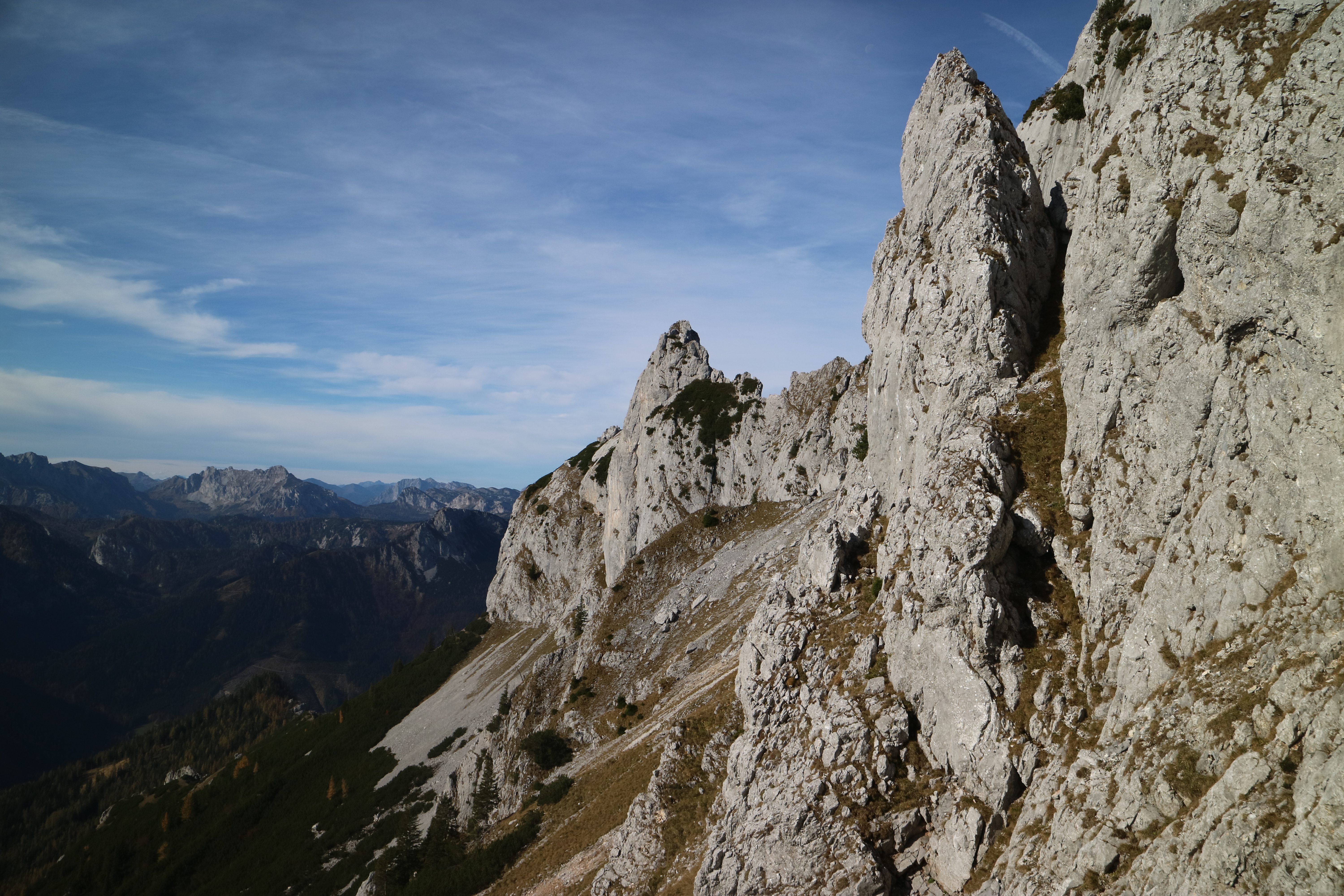 Blick vom Jagdsteig zum Käfereck zurück zum Großen Festlbeilstein, im Hintergrund die Griesmauer, Hochschwab (Steiermark)